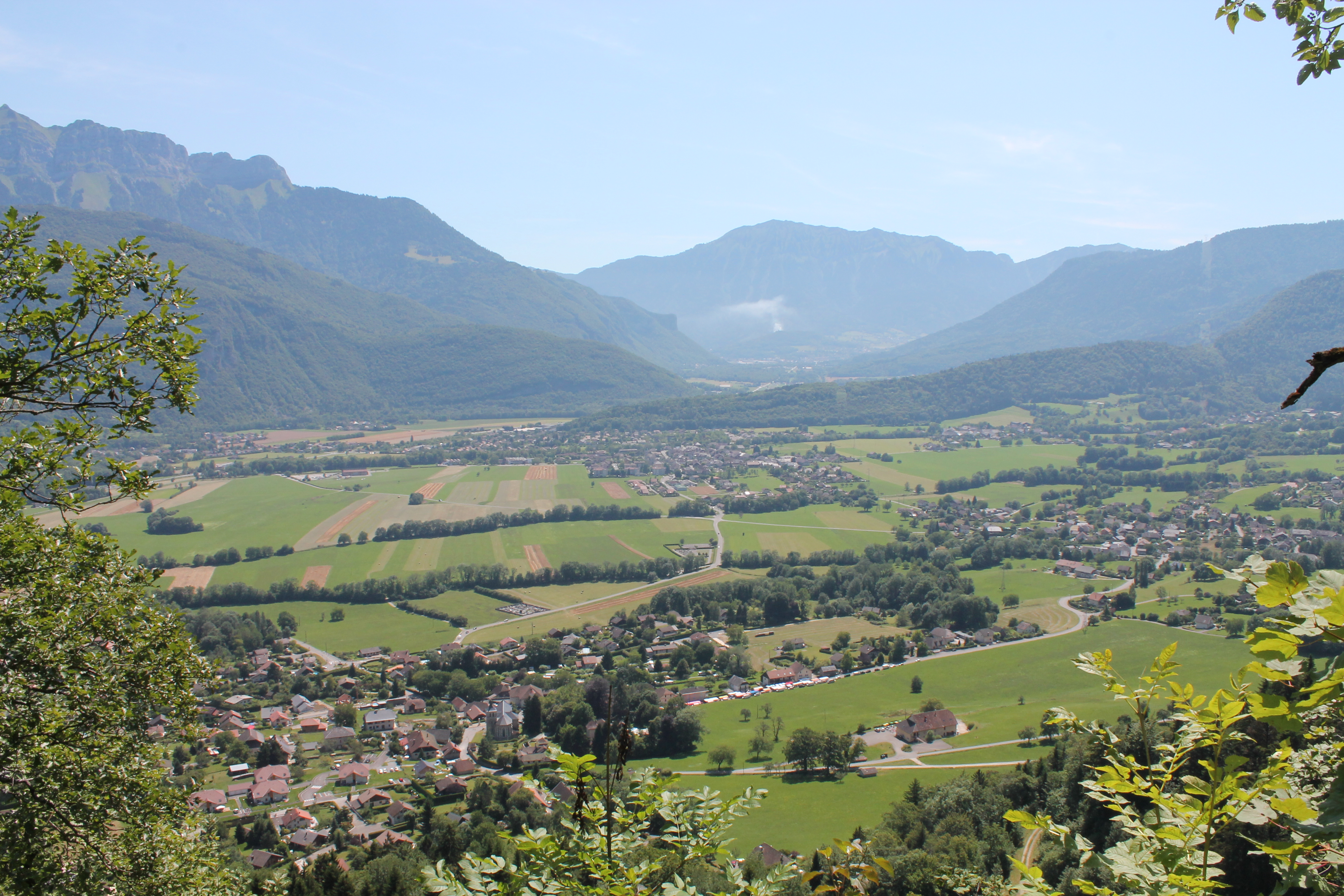 Vallée Faverges depuis l'oratoire d'Entrevernes (Lathuile au premier plan, ensuite Doussard, au loin Faverges surplombée par La Belle Etoile (1843m)